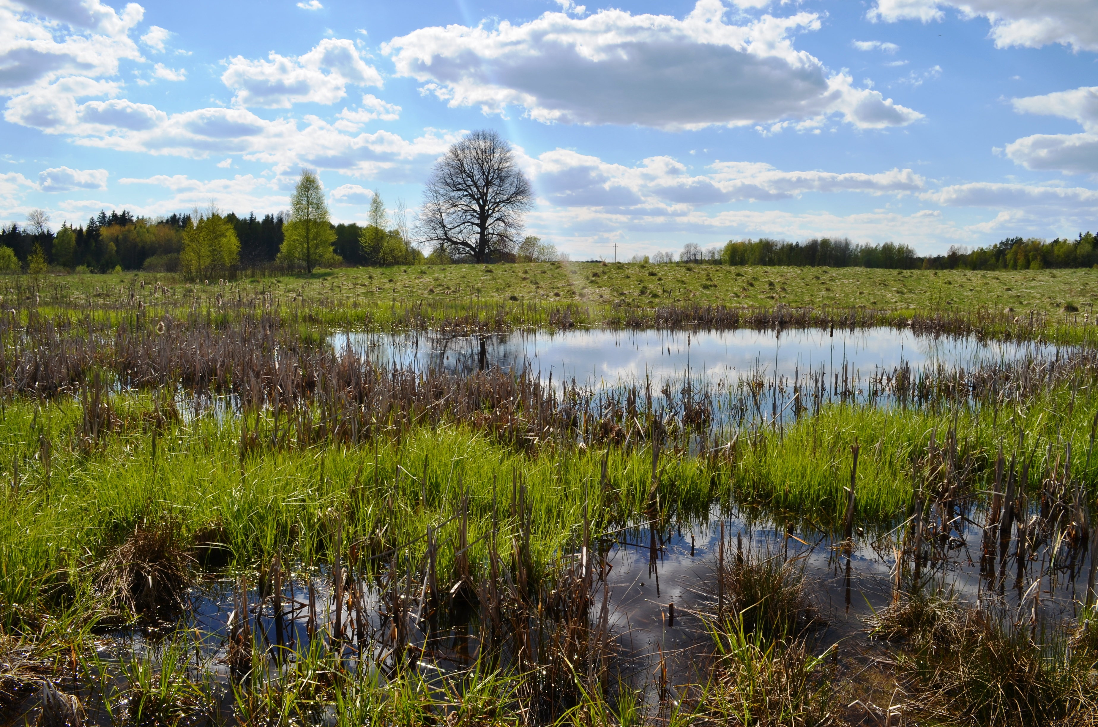 Balos ir pelkaitės šalimais Girdiškių, Bezdonių sen., Vilniaus raj.